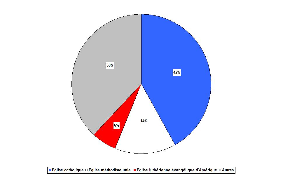 Répartition des fidèles des églises de Delphos (Ohio - Etats-Unis) en 2009